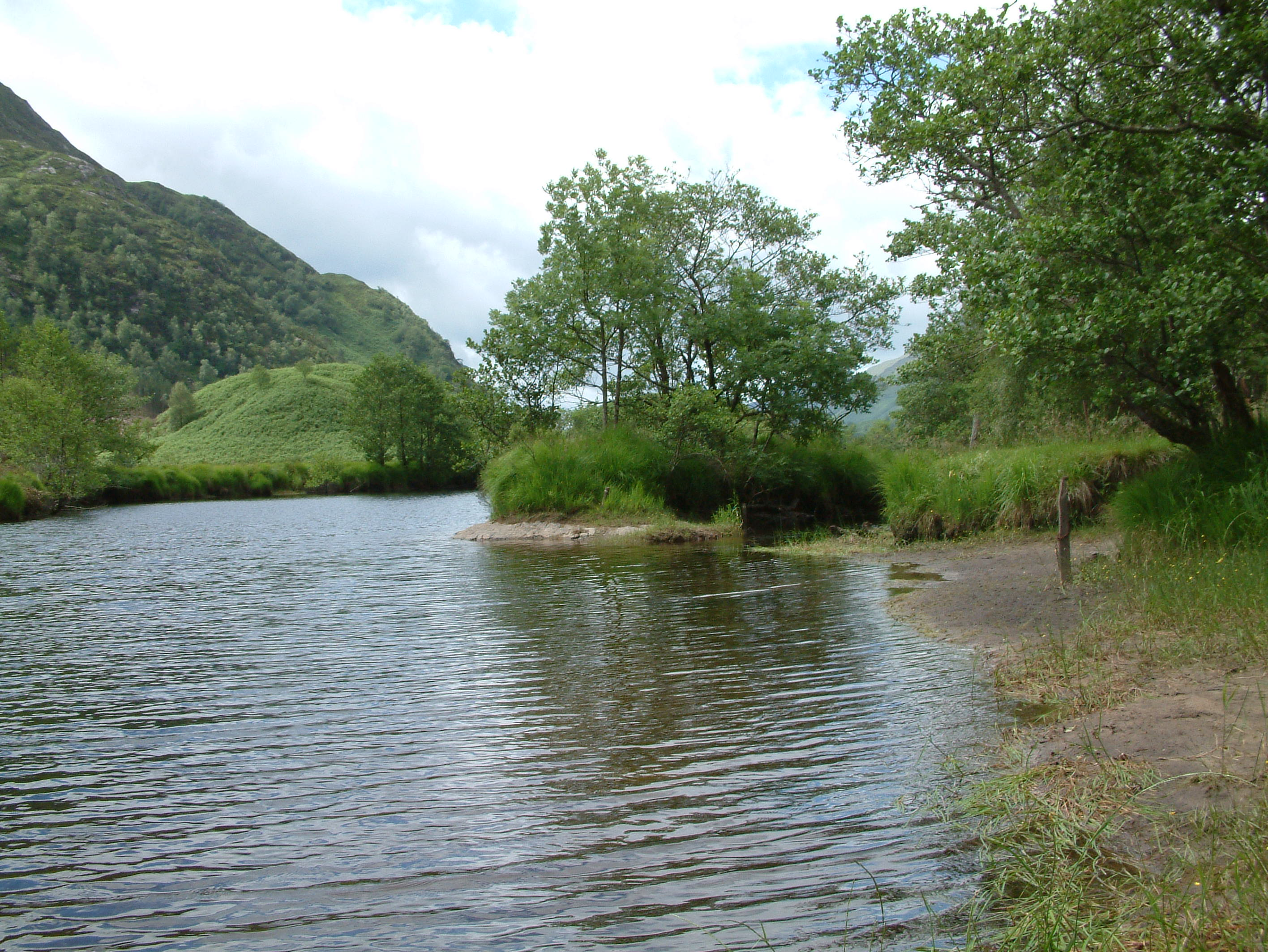 own work, StaraBlazkova 2006